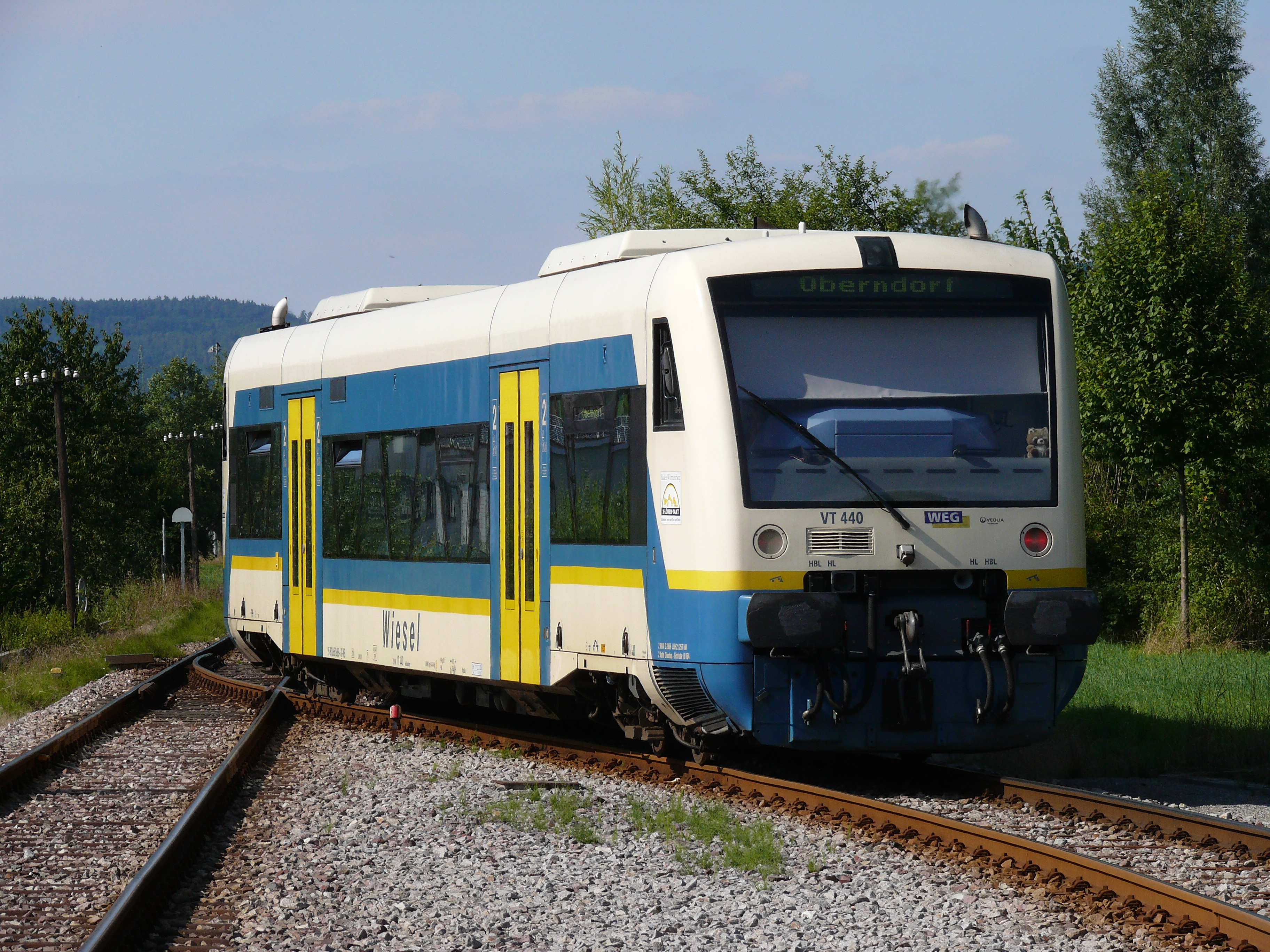 RegioShuttle -Triebwagen VT440, der "Wiesel" der Wieslauftalbahn, bei der Ausfahrt aus "Miedelsbach-Steinenberg"